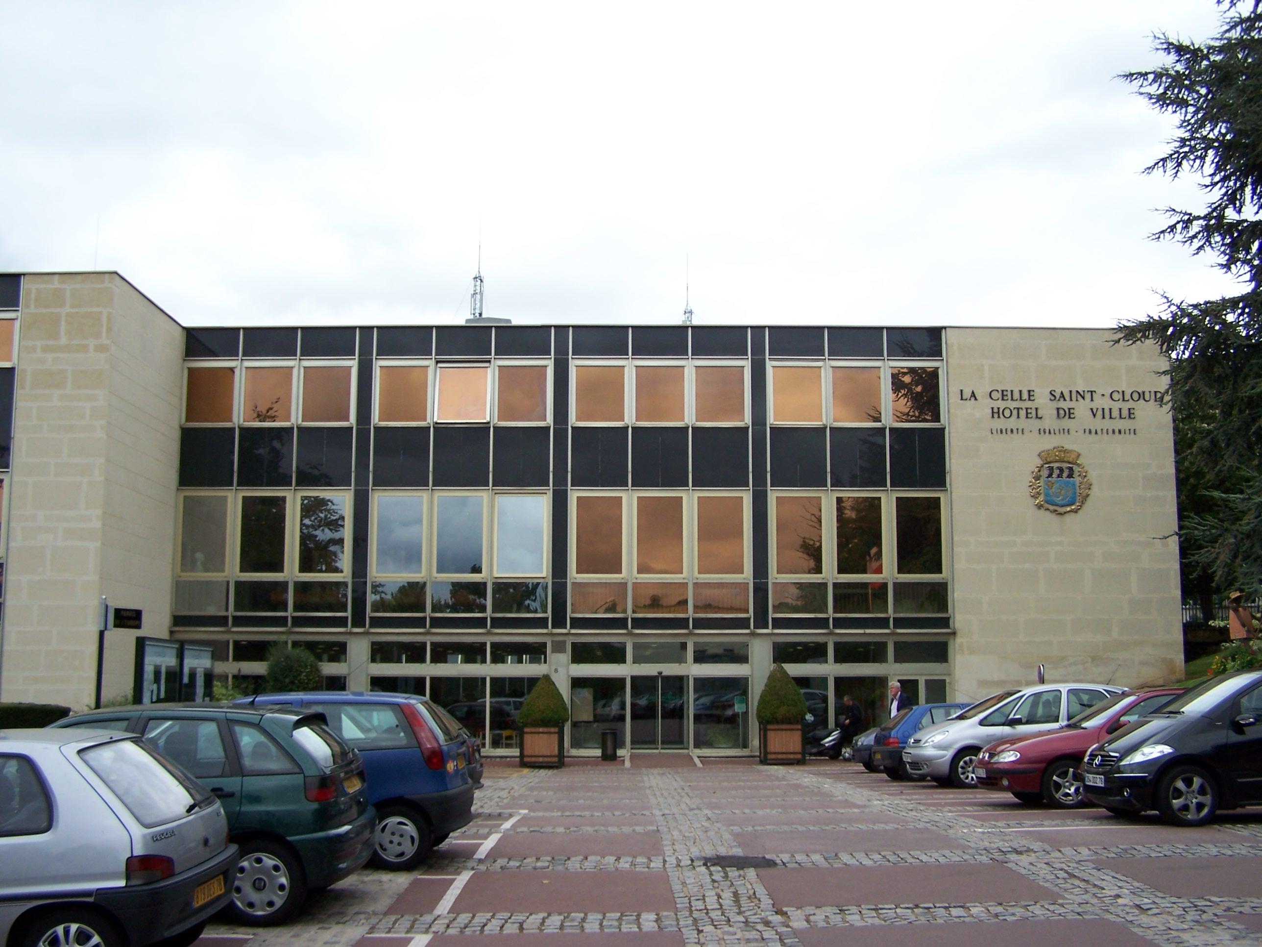 Mairie de La Celle-Saint-Cloud (Yvelines, France)